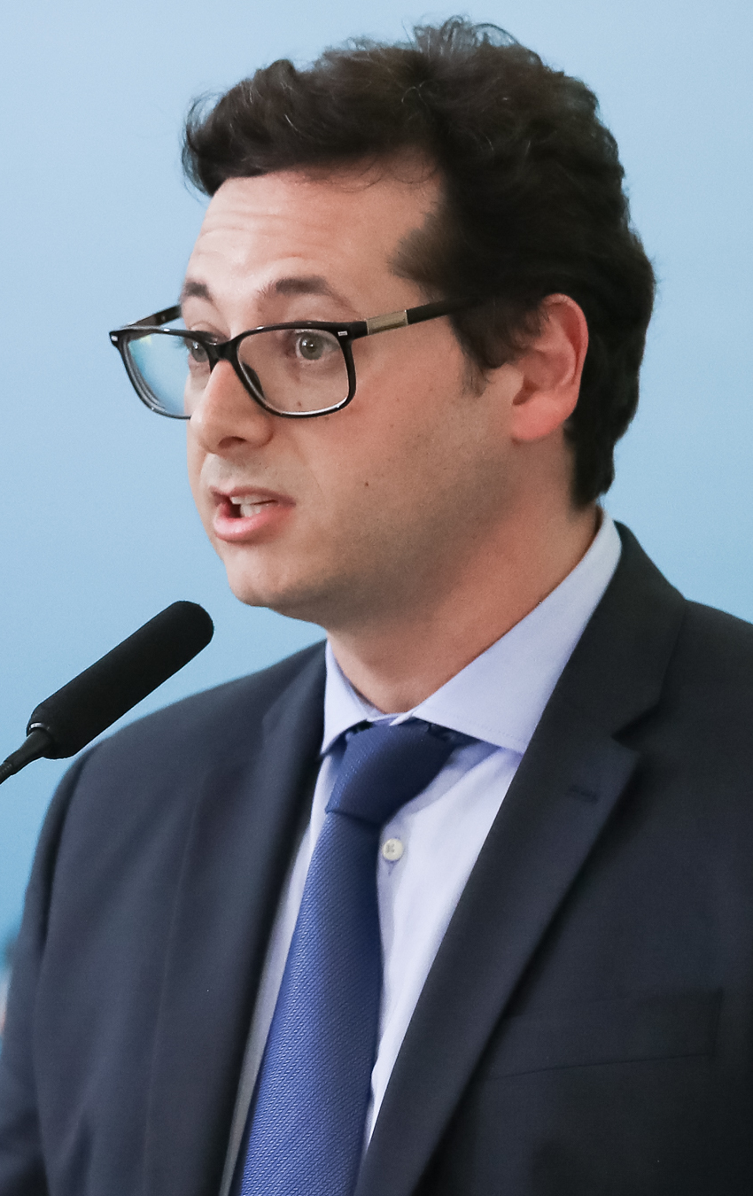 (Brasília - DF, 20/05/2019) Apresentação da 2ª Fase da Campanha Publicitária da Nova Previdência.Foto: Marcos Corrêa/PR